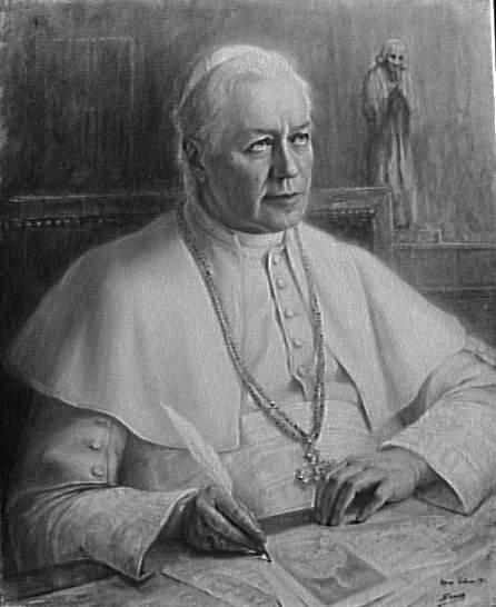 Portrait de Giuseppe Melchiore Sarto, pape Pie X